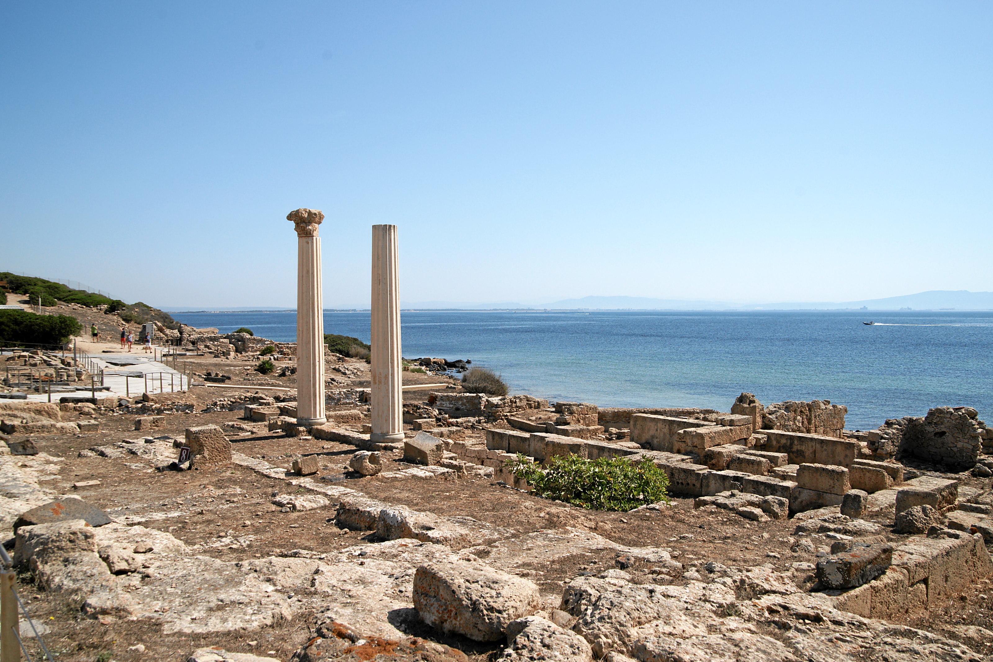 Tharros: due Colonne